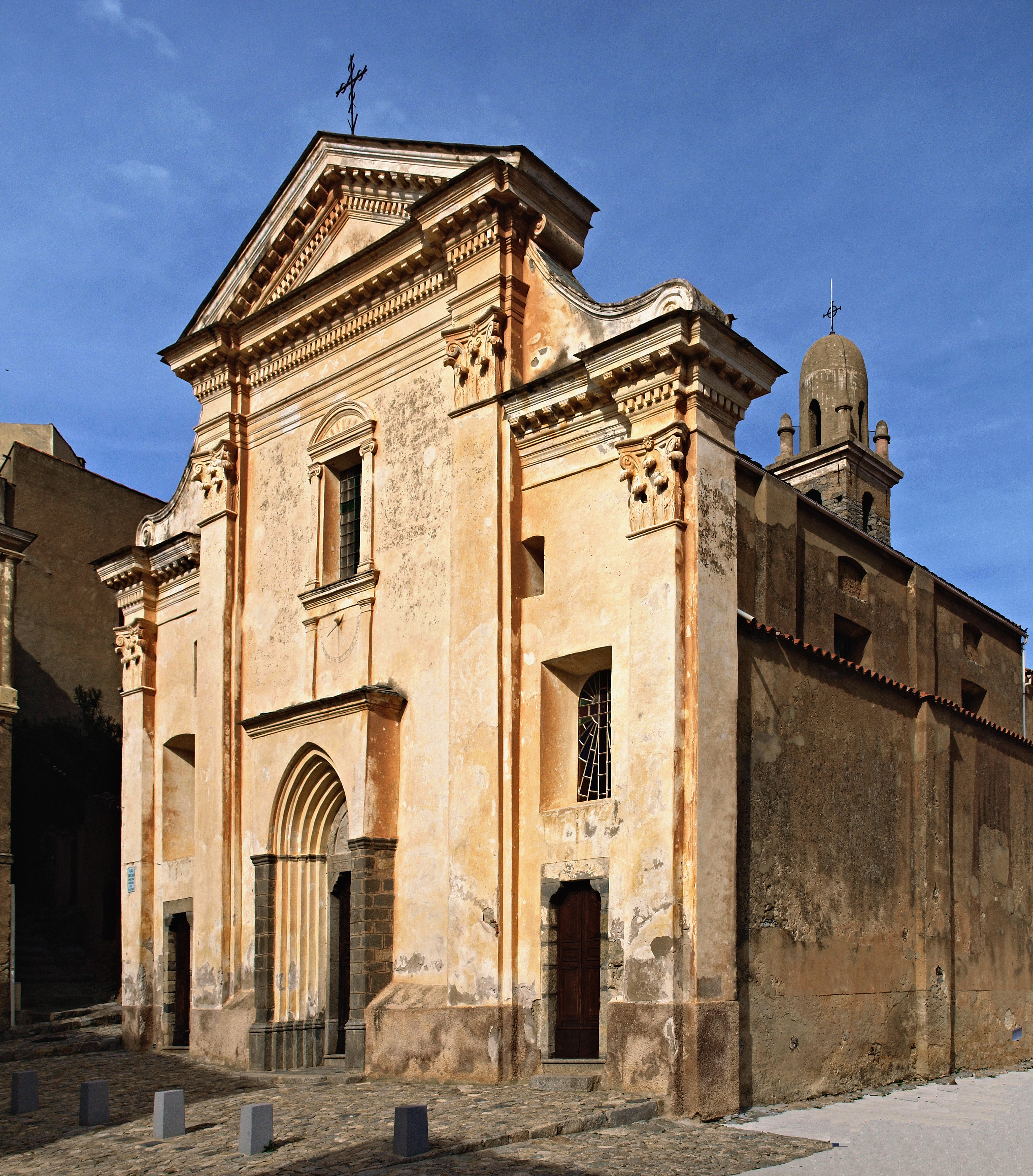 Speloncato (Corsica) - Collégiale Santa-Maria Assunta